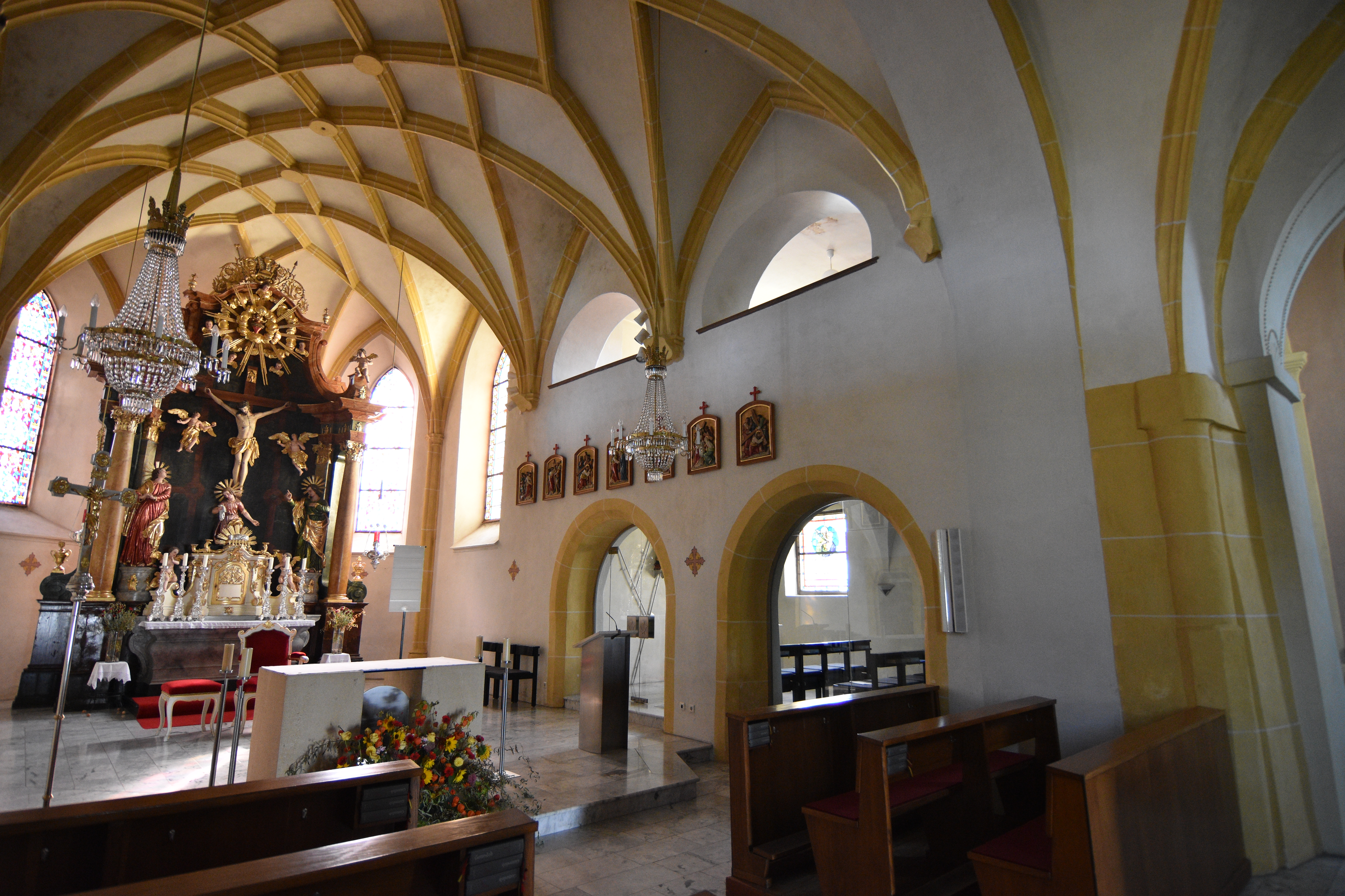 Pfarrkirche St. Marein bei Graz Interior